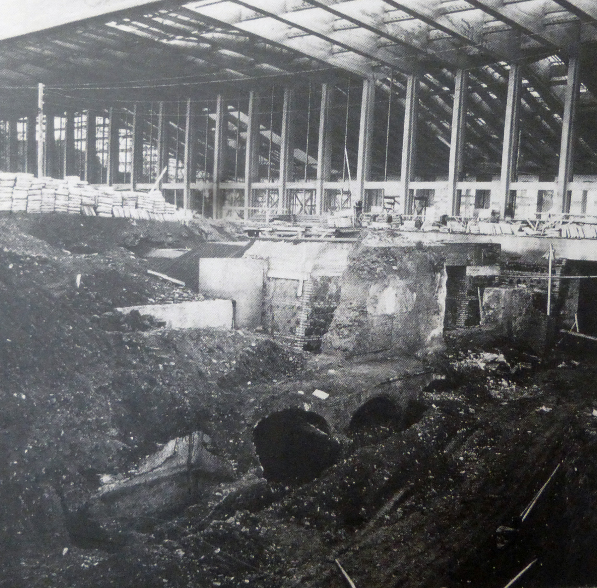 Roma, Palazzo Massimo alle Terme, foto degli scavi del 1947 sul piazzale della Stazione Termini.